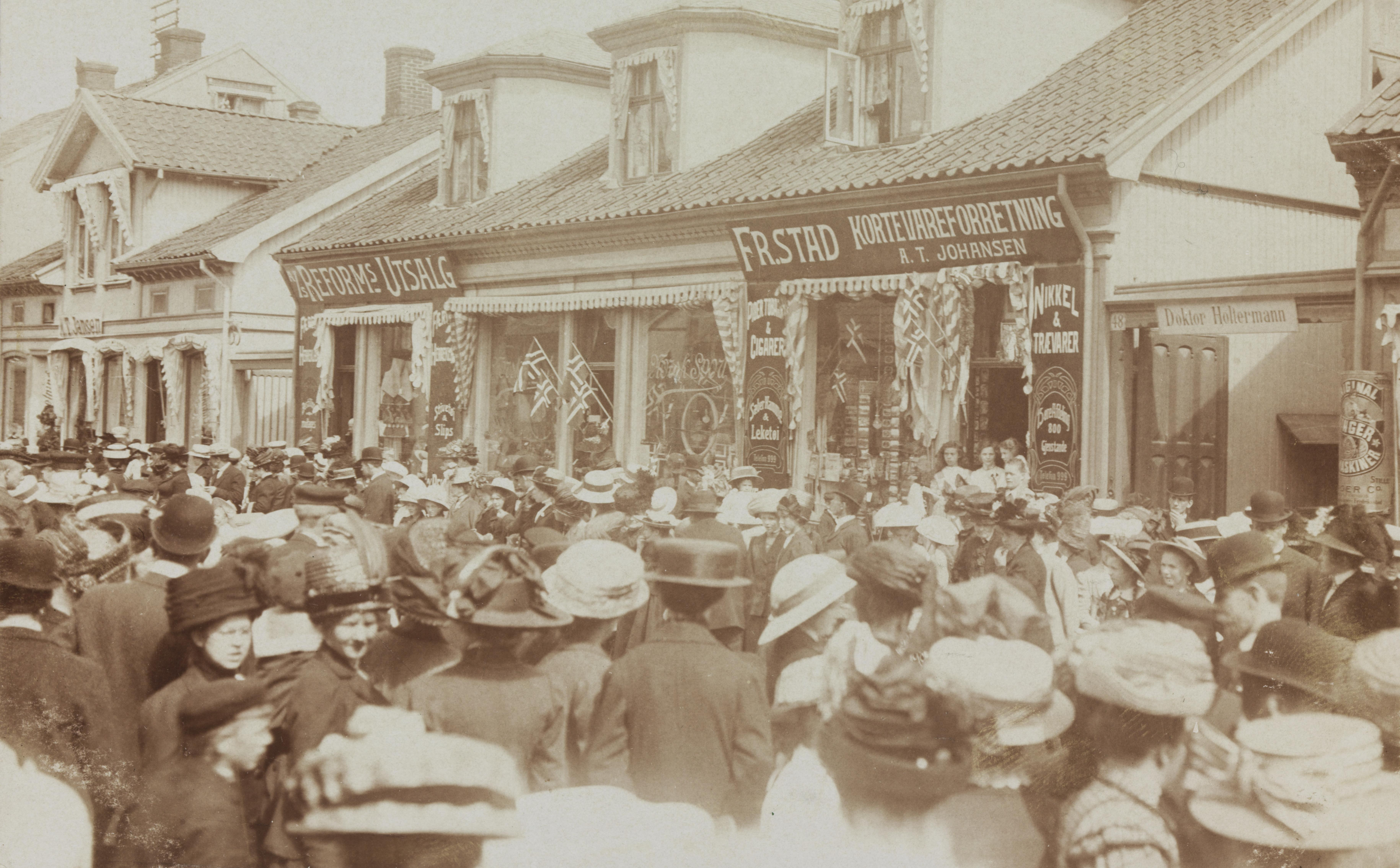 Bildet er hentet fra Nasjonalbibliotekets bildesamling Nygaardsgata, Fredrikstad, Østfold